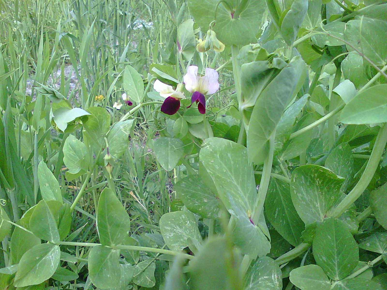 گل‌های وحشی الوند (خُل‌لار)